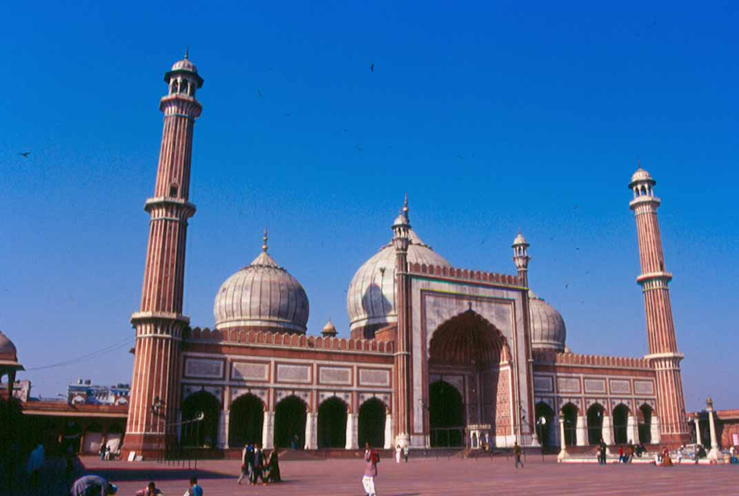 Mezquita en Delhi (India) Jama Masjid, mosque in Dehli